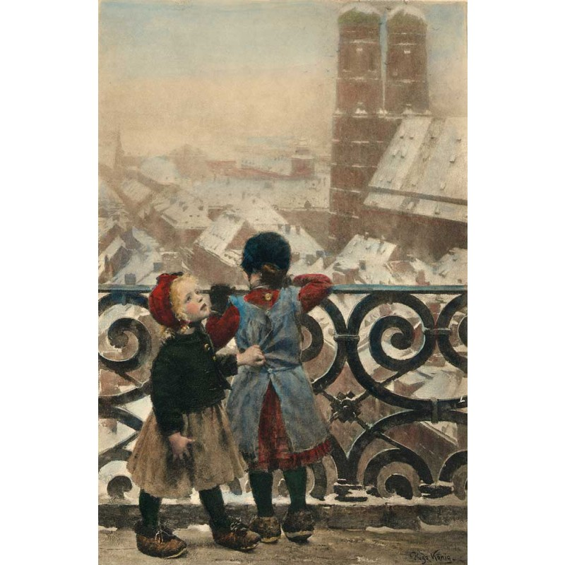 Hugo König: Beim Türmer von St. Peter (München), um 1891, Öl auf Leinwand, 134,0 x 89,7 cm